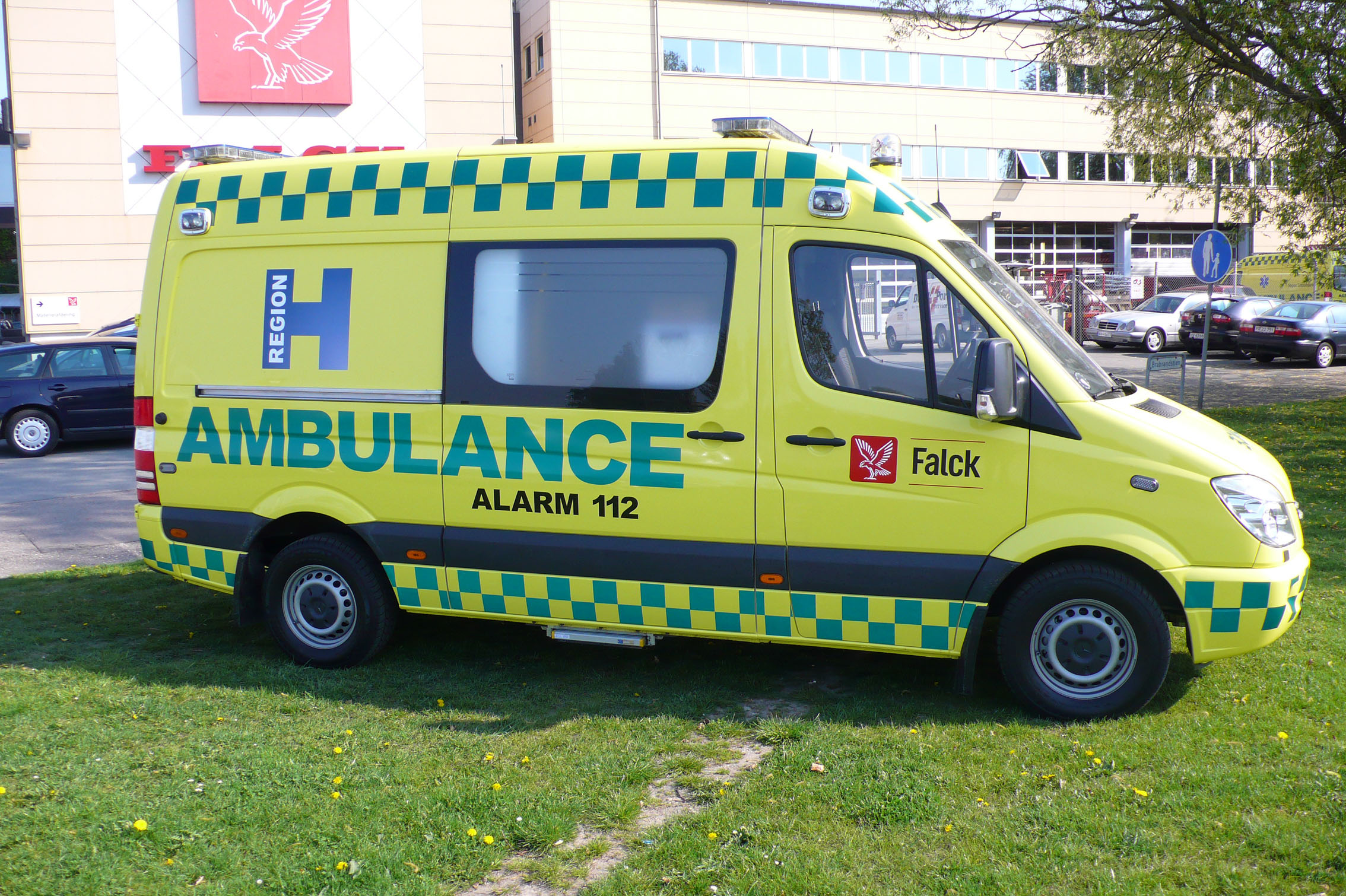 Ambulance fra Region Hovedstaden i Danmark.